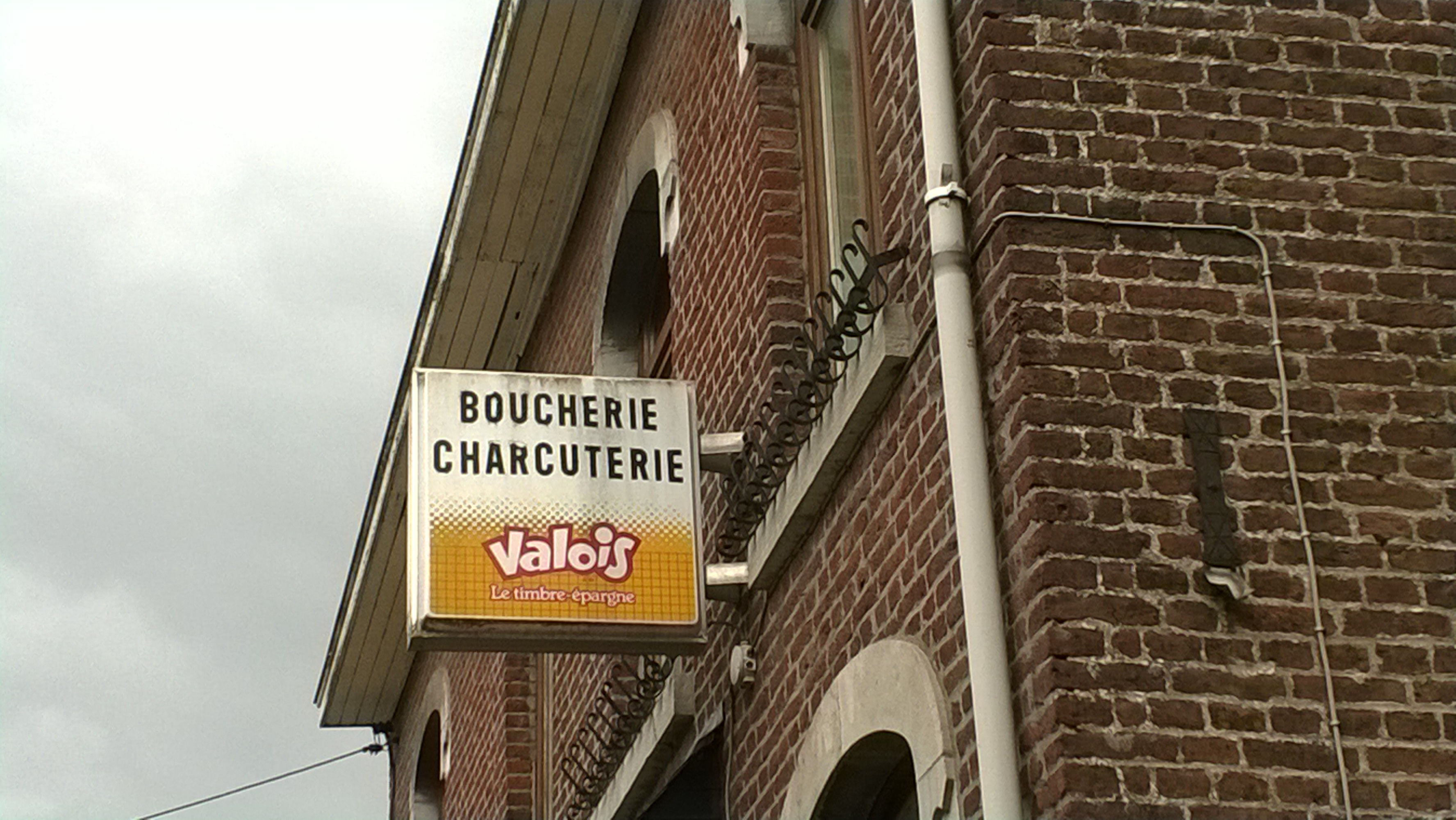 Oleye, publiciteitsbord Valoiszegels